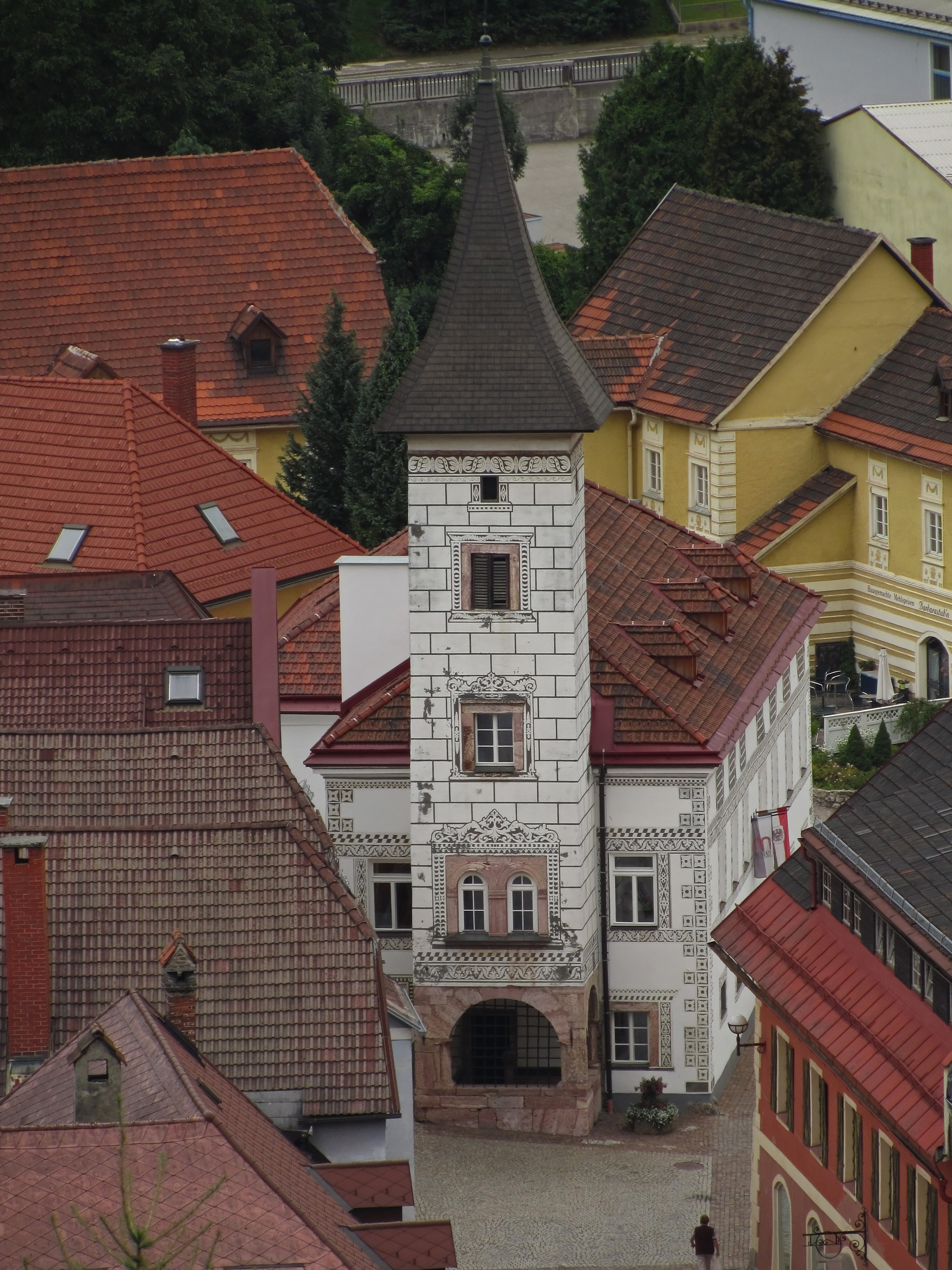 Das Rathaus wurde 1535 erbaut, 1548 erweitert und 1580 bekam es den ostseitigen Turm. 1610 erfolgte die Sgraffitobemalung durch W. Grill. In den Jahren 1615, 1690 und 1745 wurde es durch Brände beschädigt. 1853 wurde es an die Staatsverwaltung übergeben und 1977 wiederhergestellt. Einige Jahrzehnte war hier das Bezirksgericht für den ehemaligen Gerichtsbezirk Eisenerz untergebracht. Seit 2011 beherbergt das alte Rathaus das Stadtmuseum Eisenerz.